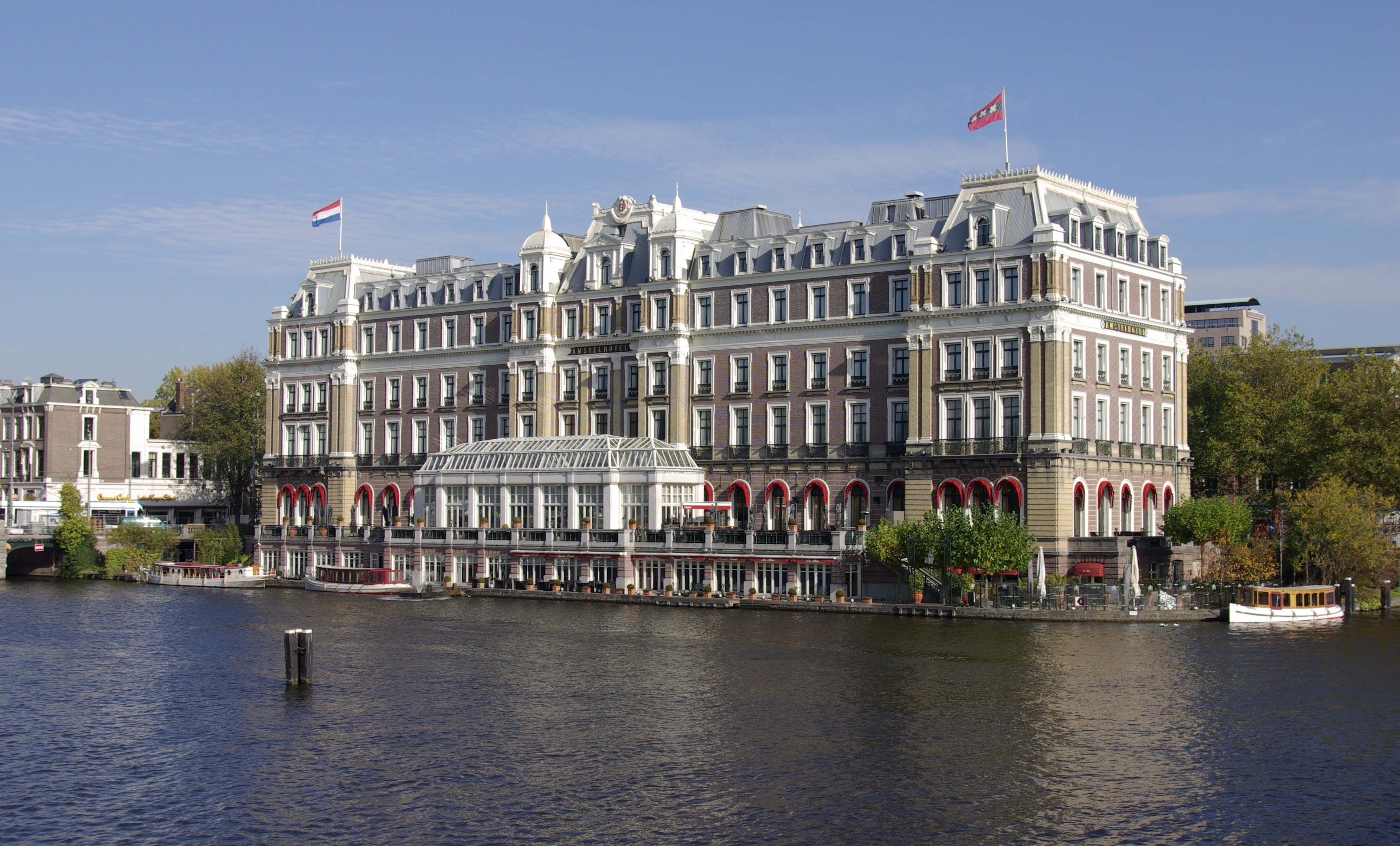 Das Amstelhotel in Amsterdam 95″ N, 4° 54′ 18.87″ E